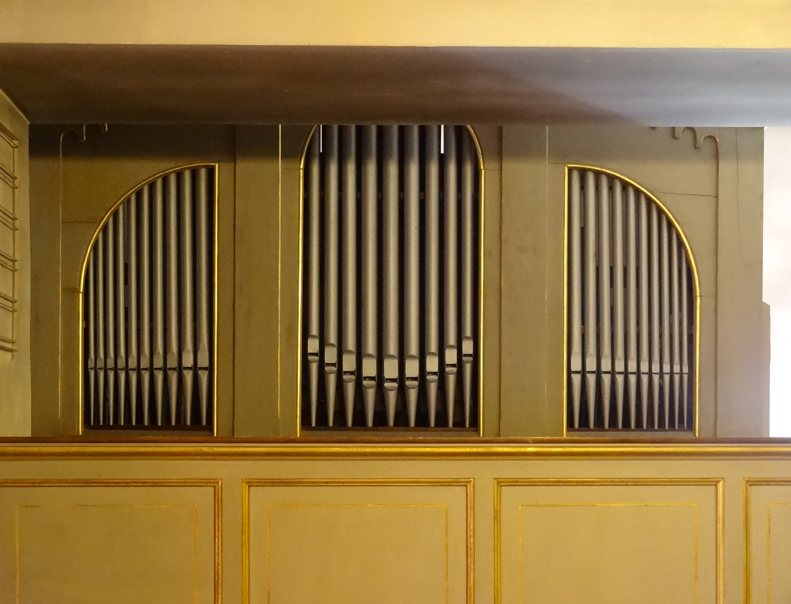 Evangelische Kirche (Oppenrod)